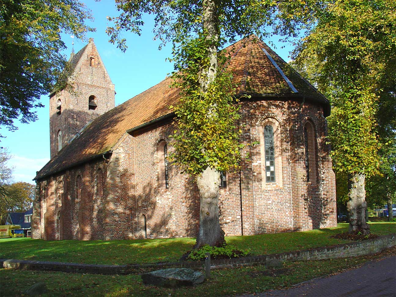 De Margarethakerk van Norg